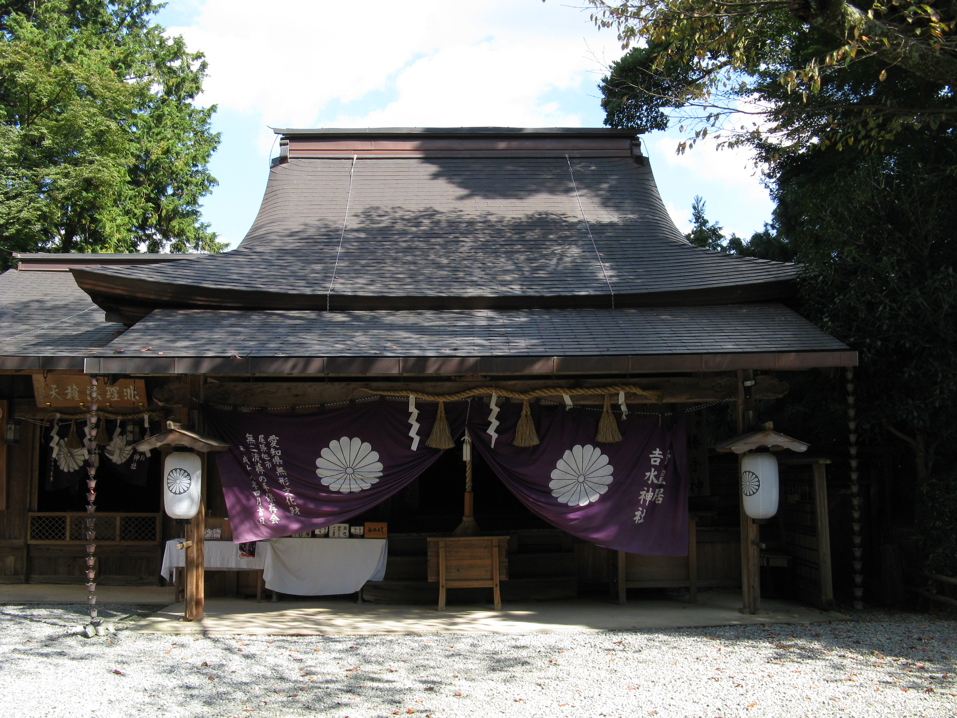 吉水神社 拝殿